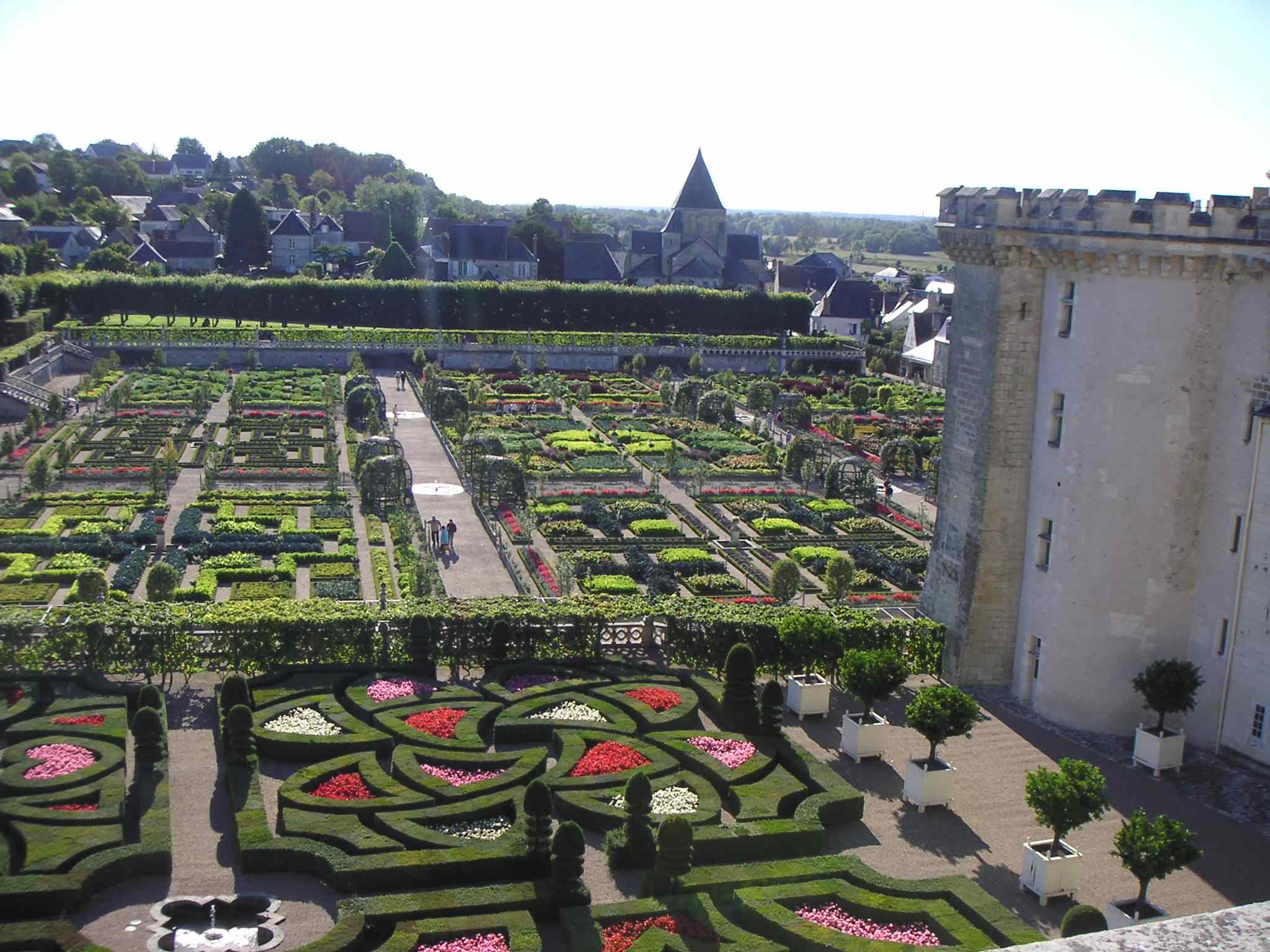 Les jardins du château de Villandry (France)